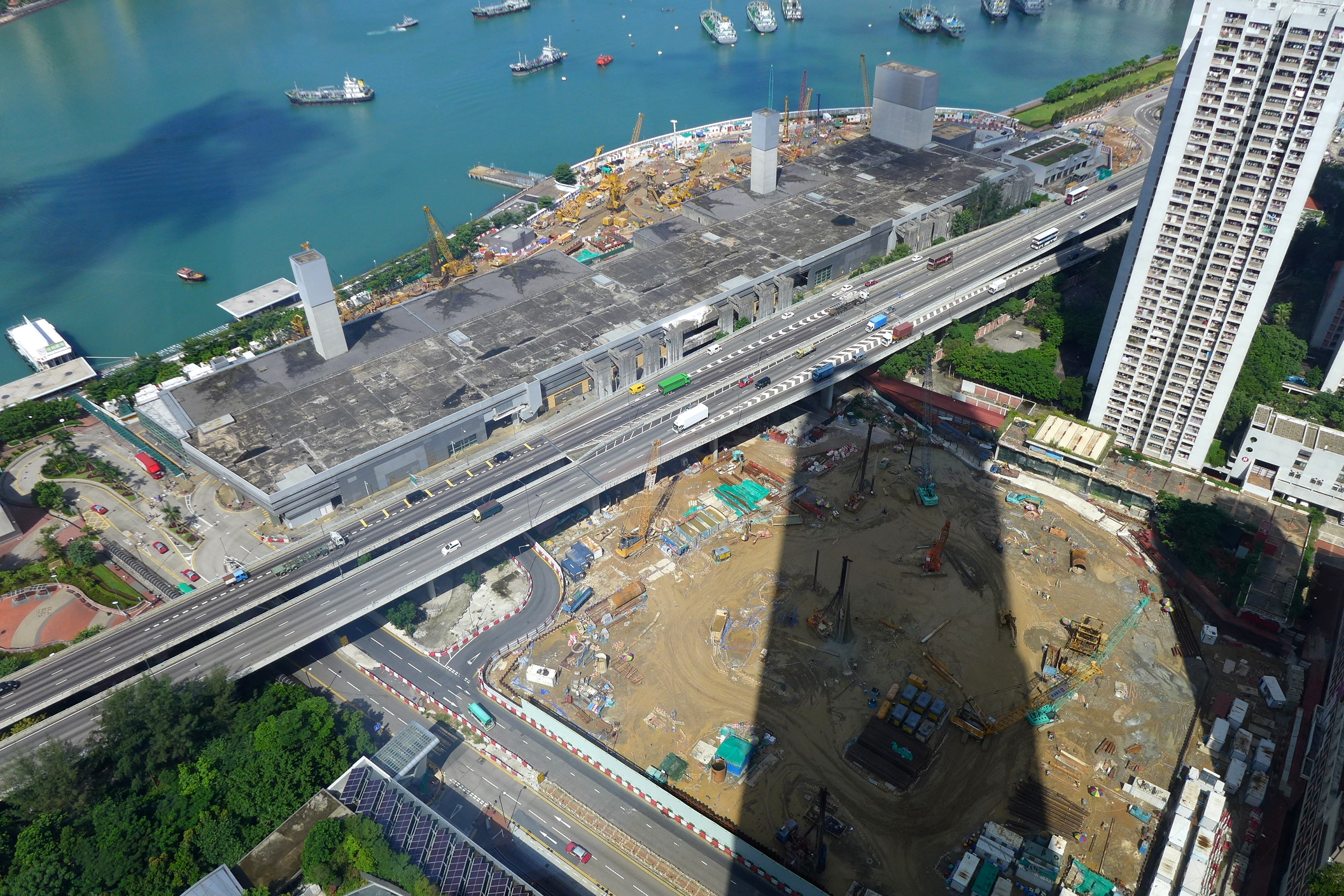 Tsuen Wan West TW5 Bayside Development